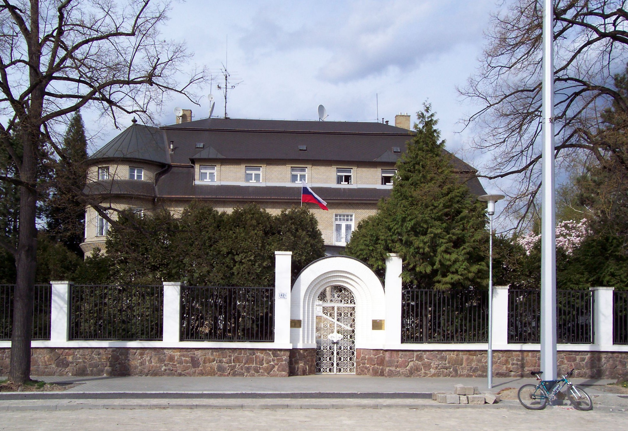 Generální konzulát Ruské federace v brněnských Pisárkách na adrese Hlinky 142b